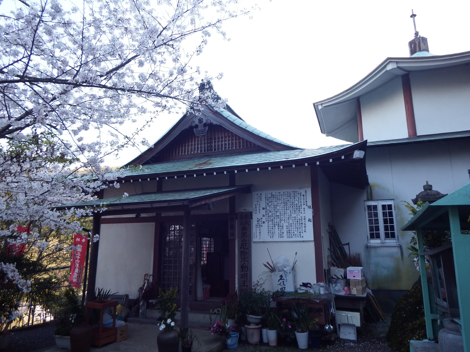 厄除不動明王院